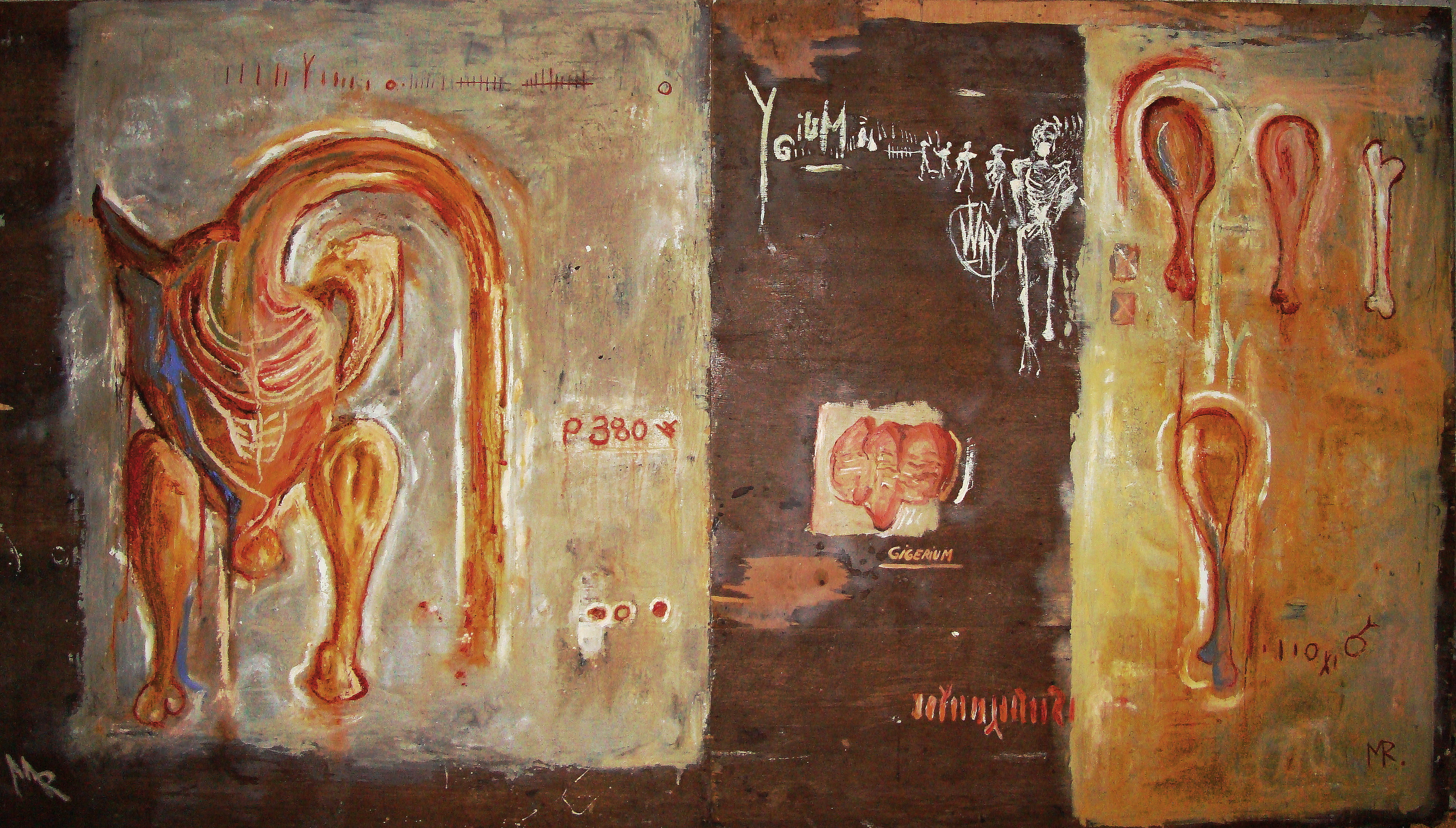 Gigerum YG 80 / Huile et techniques mixtes sur panneau. 480 X 220 CM Collection DADIDOFF RUSSIA